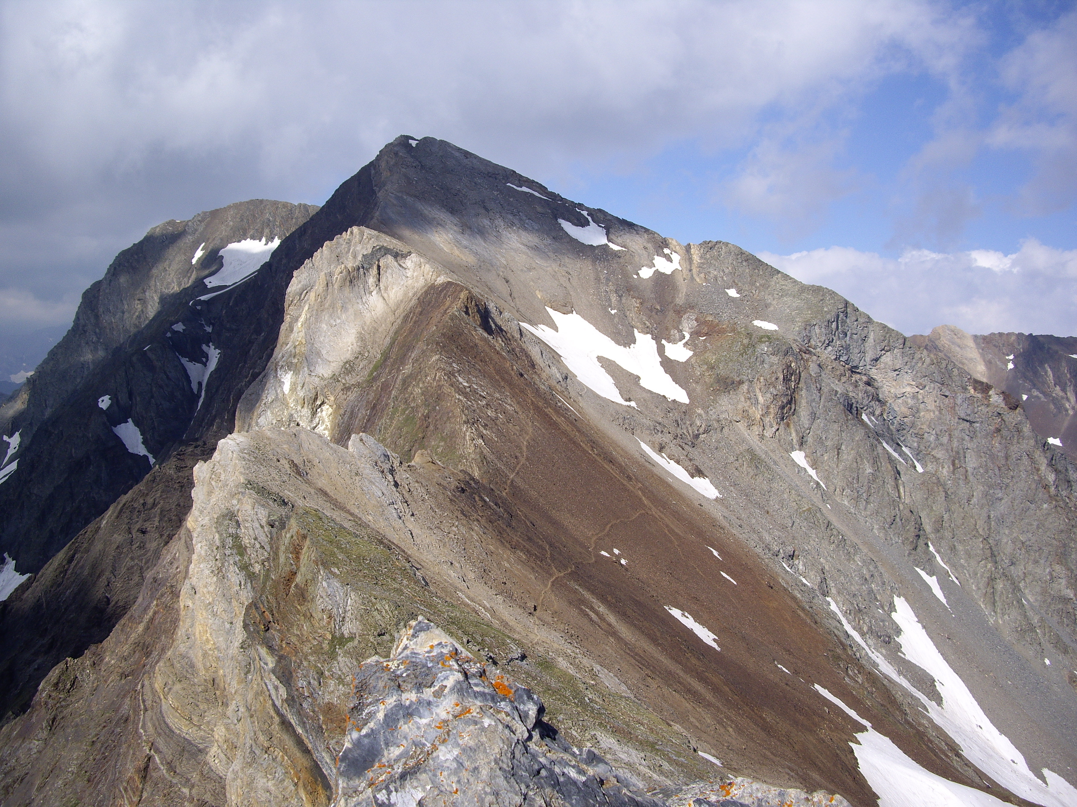 Pic Campbiel (vue du Pic d'Estaragne=